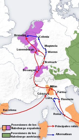 Camino Español Camino Español en tiempos de Felipe II para llevar hombres de España a Flandes.